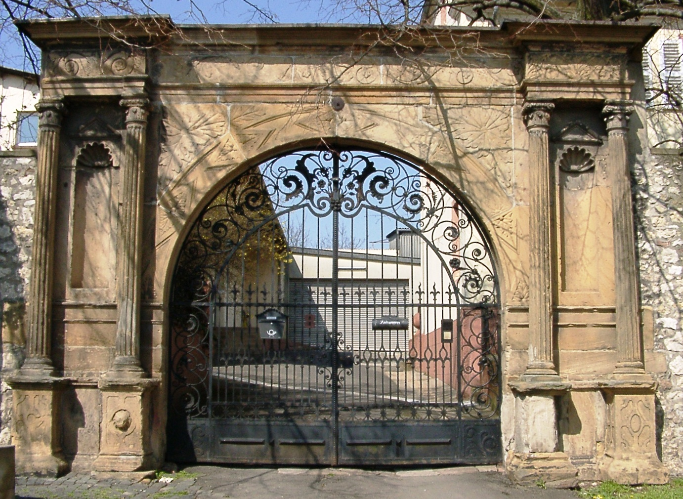 Emichsburg